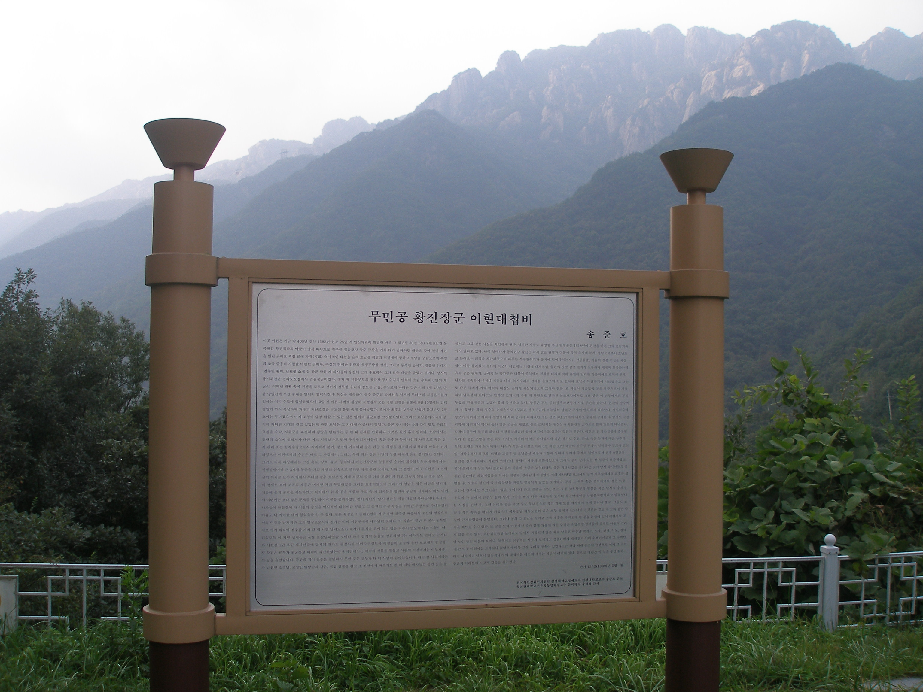 ichi battle memorial sign